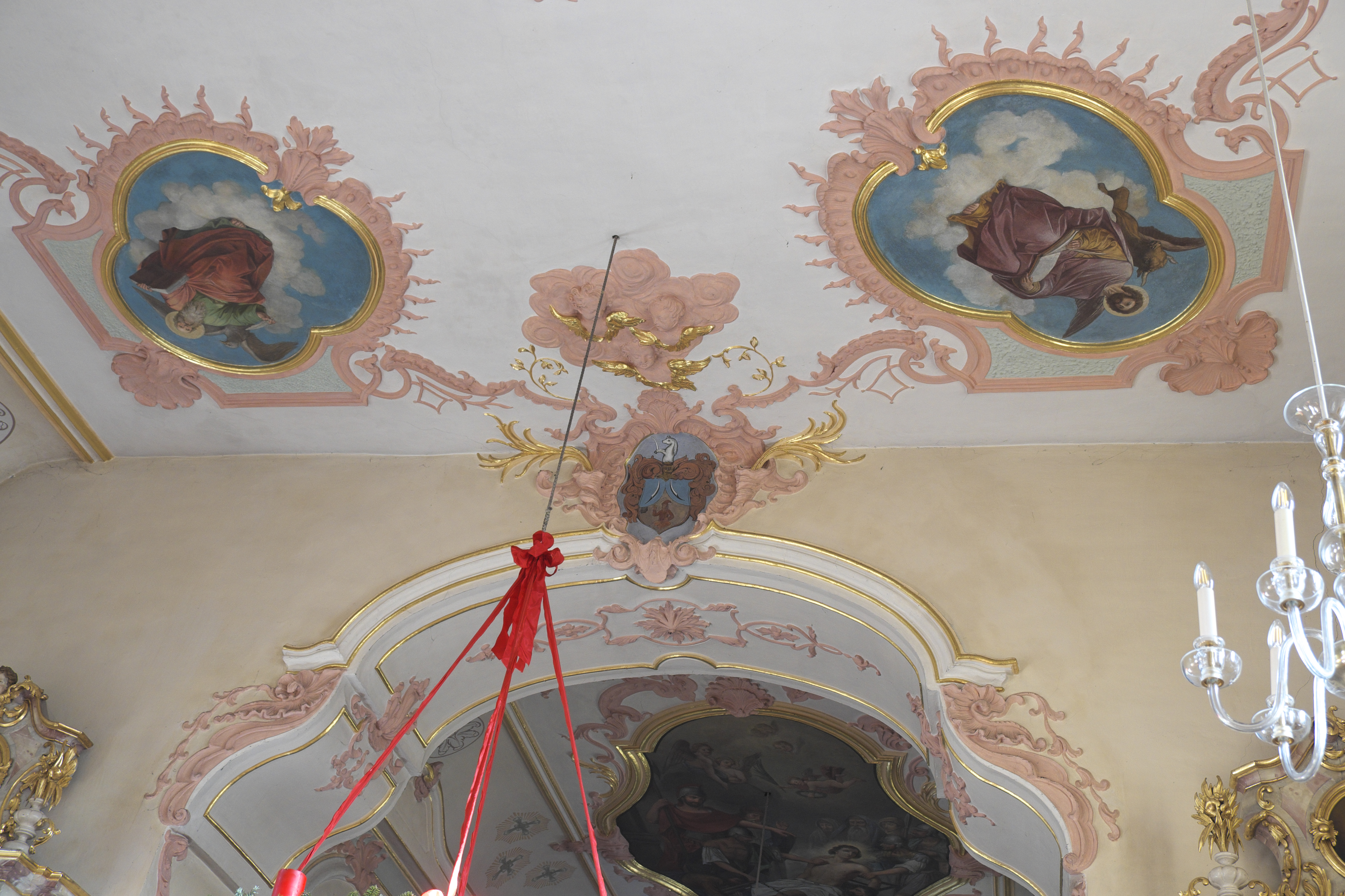 Katholische Pfarrkirche St. Laurentius in Petershausen im Landkreis Dachau (Bayern/Deutschland), Deckenmalerei im Langhaus